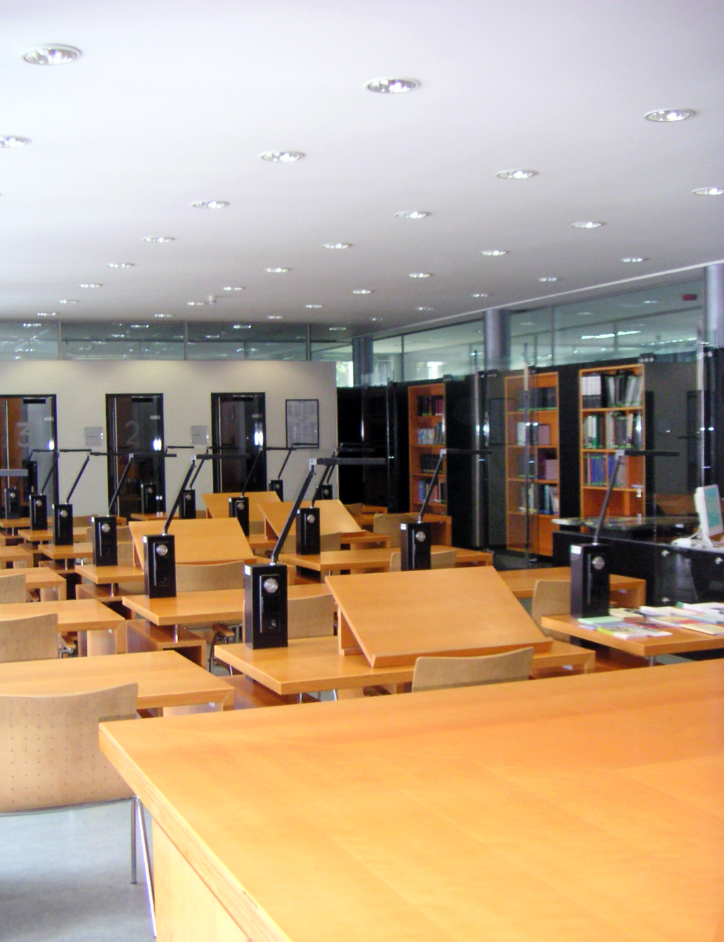 Lesesaal des Kärntner Landesarchives, fotografiert von Benutzer:Binter first uploaded to de-WP: 21:59, 5. Aug 2005 Benutzer:Binter